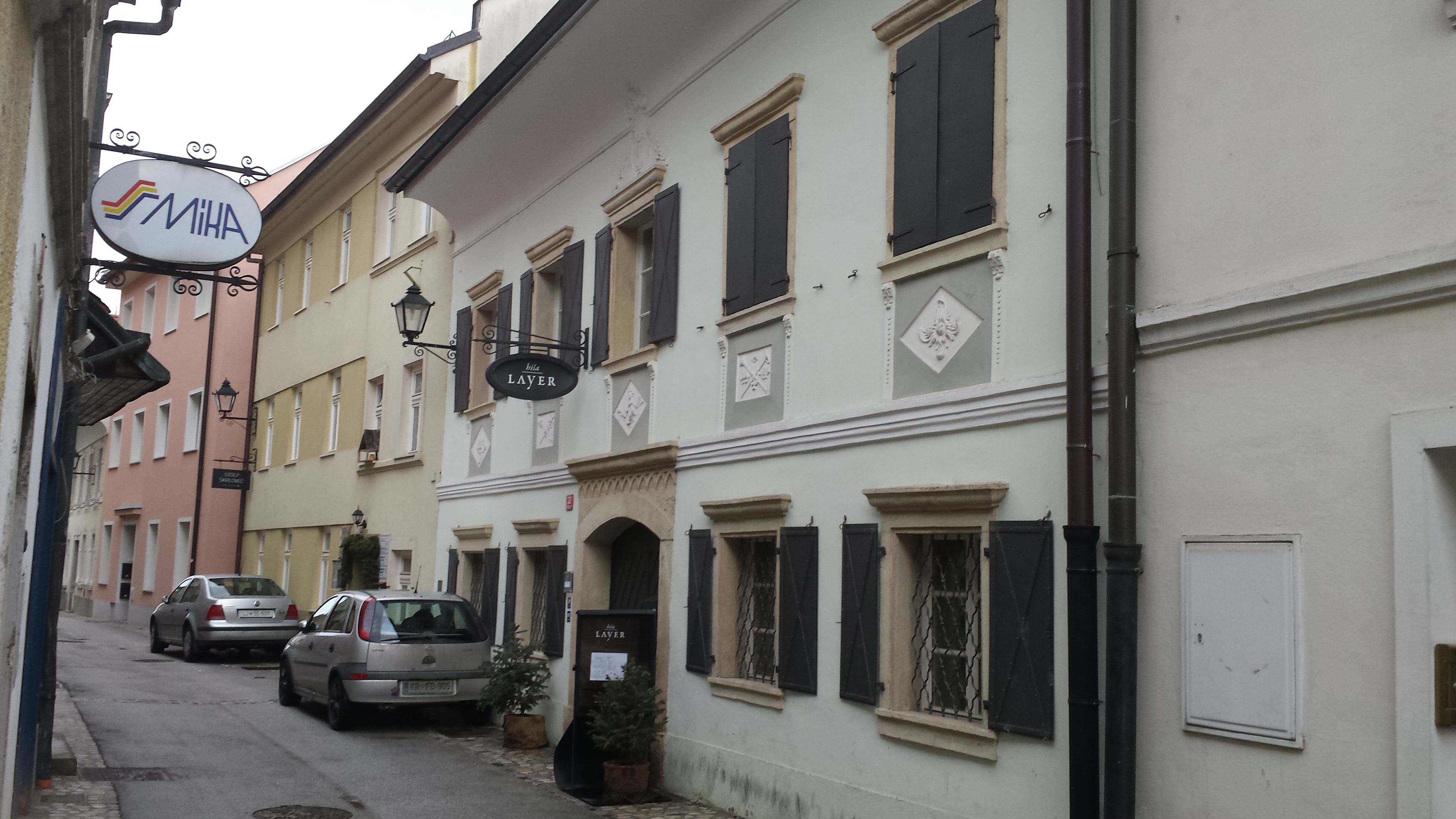 Layerjeva hiša, Kranj Avtor: M. Mravlja